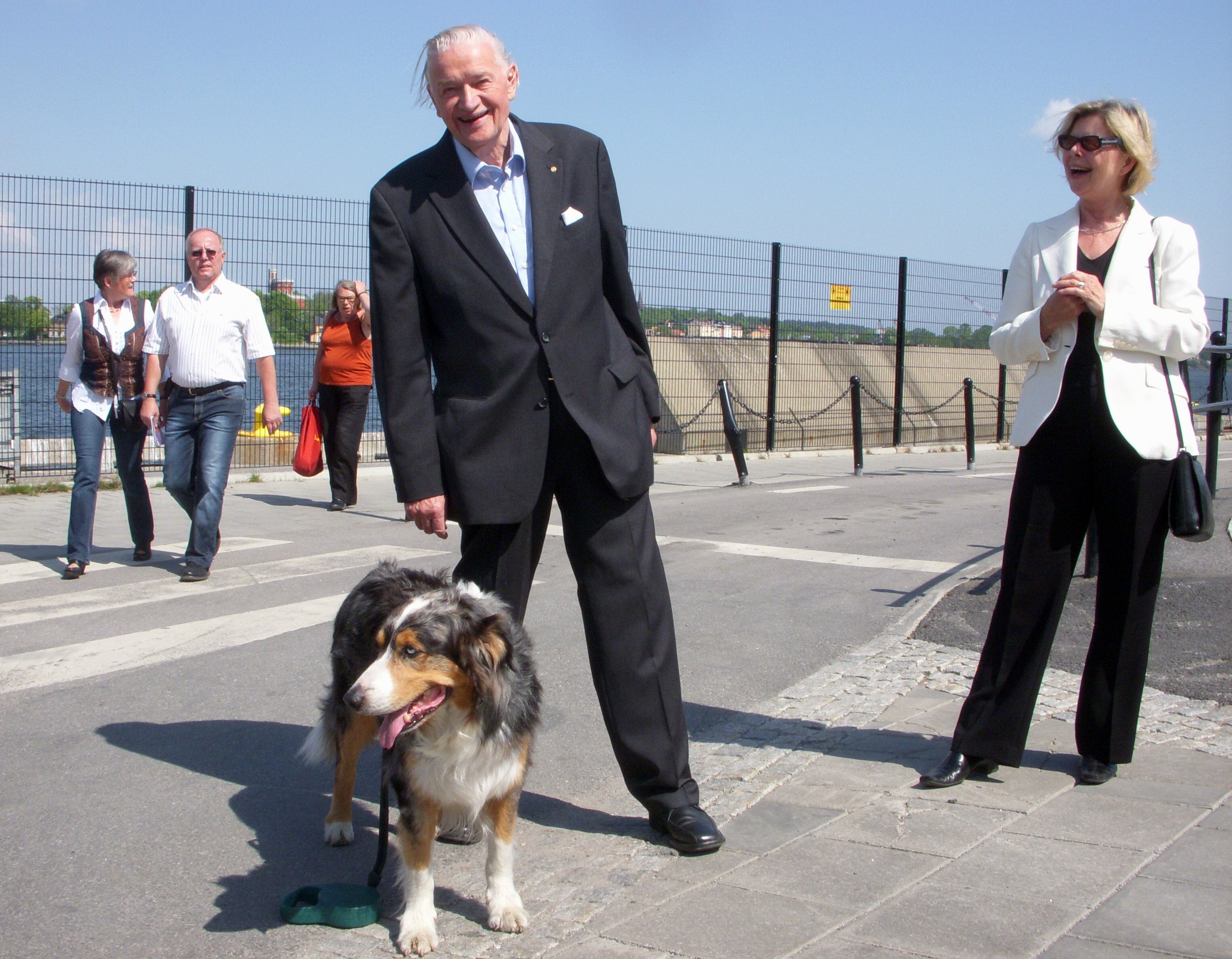 Fotografen Lennart Nilsson på väg till nyöppnade "Fotografiska" i Stockholm